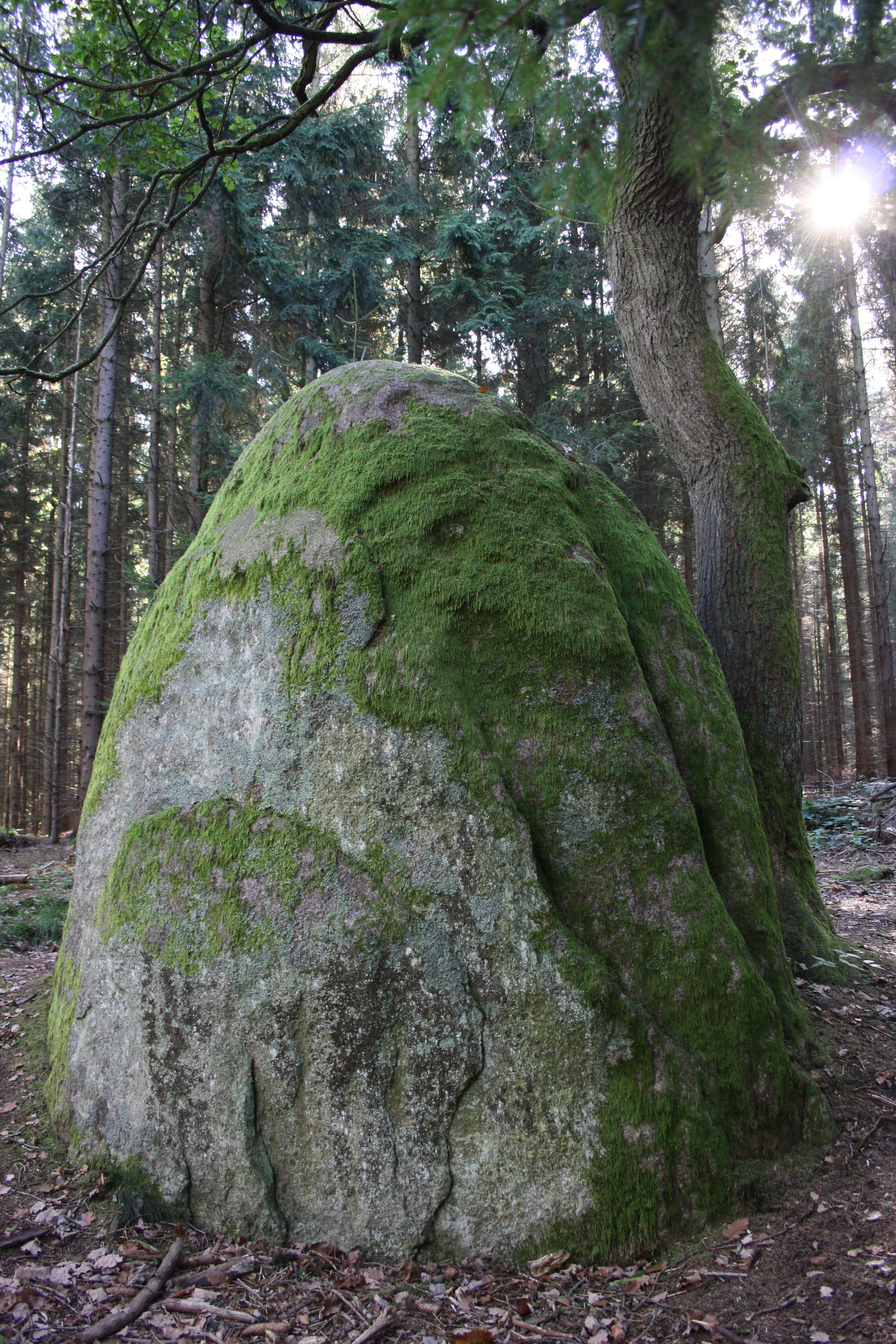 Harz Wanderung Stecklenberg - Hexentanzplatz / Thale - Am Glockenstein